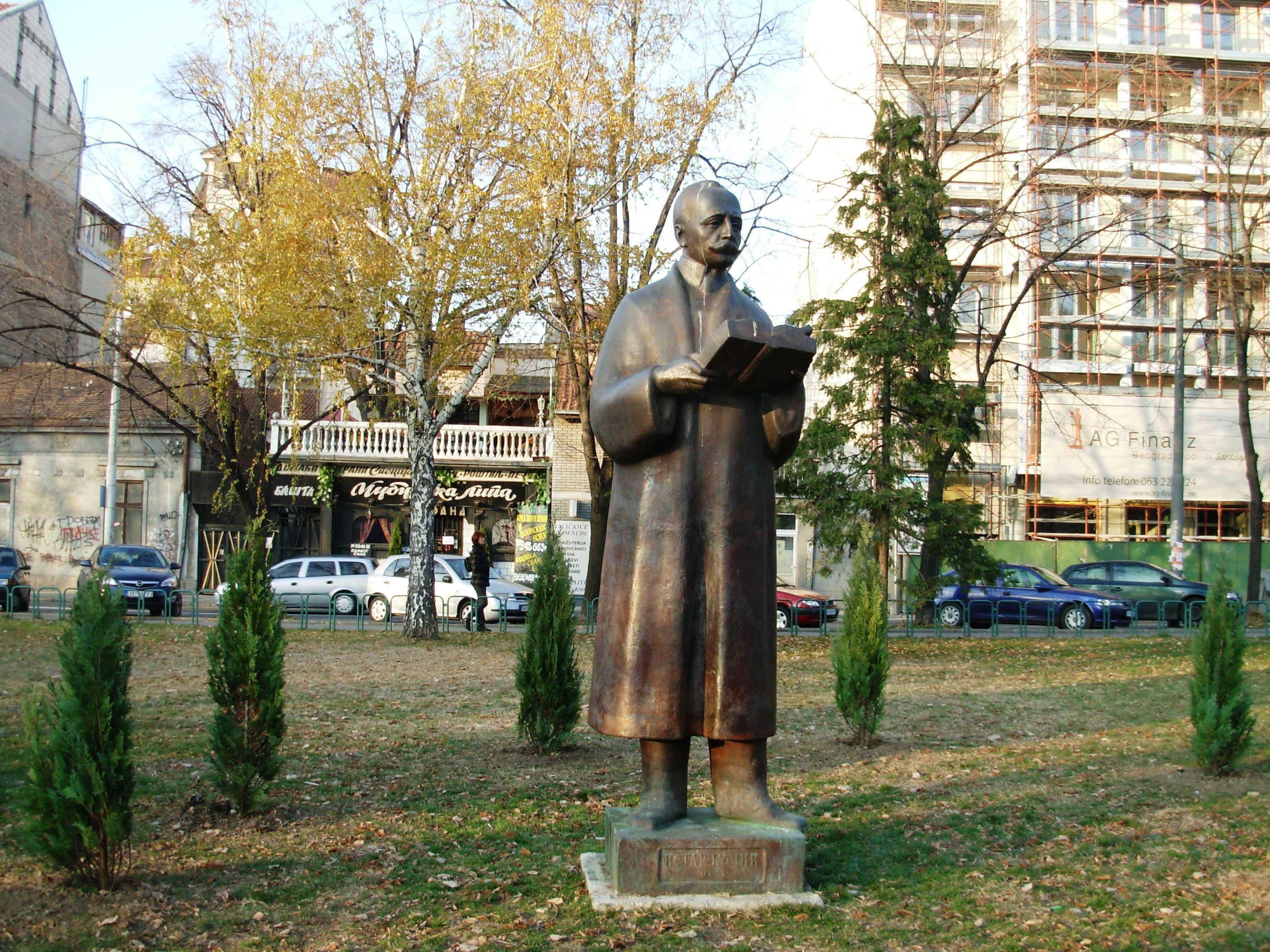 Споменик Петру Кочићу, Чубура, Београд. Сликао Голдфингер